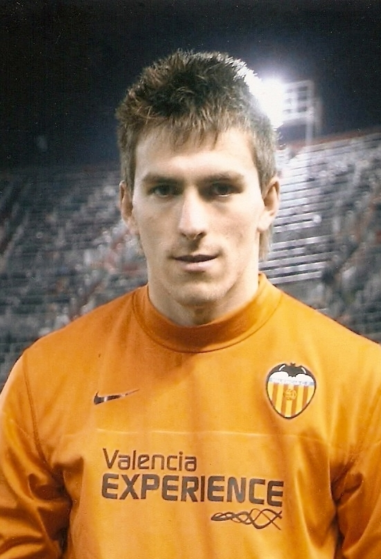 Vicente Guaita Panadero. Futbolista del Valencia C.F.